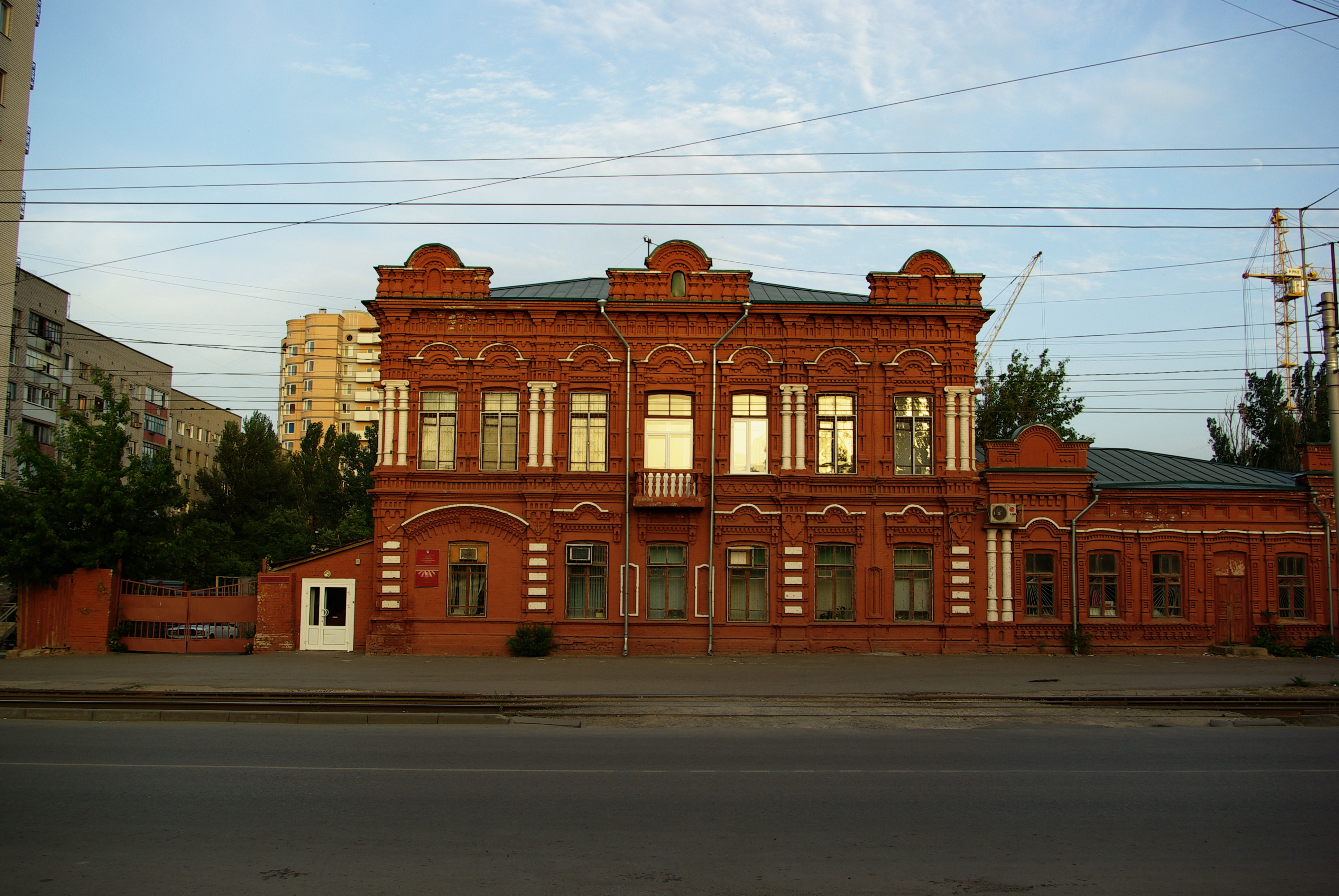 Церковно-приходская школа (Росторгреклама). Конец XIX века (на фасаде указано "1906"), автор не установлен. Волгоград, ул. Циолковского, 15а.